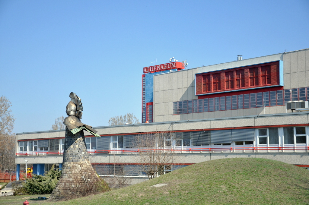 Athenaeum book publishing company in Budapest District X